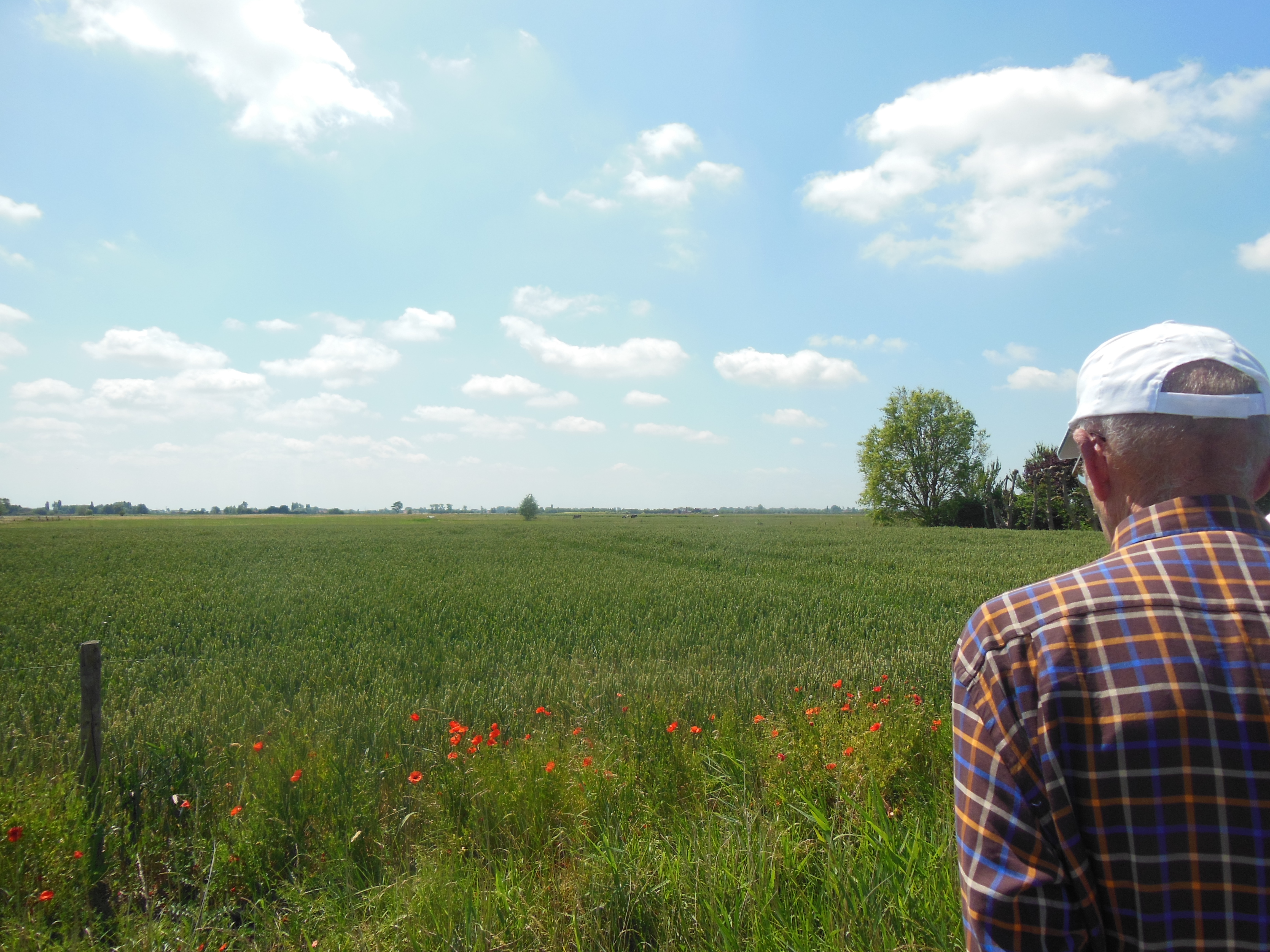 Een zicht op een kreekrug in de komgronden van Lampernisse